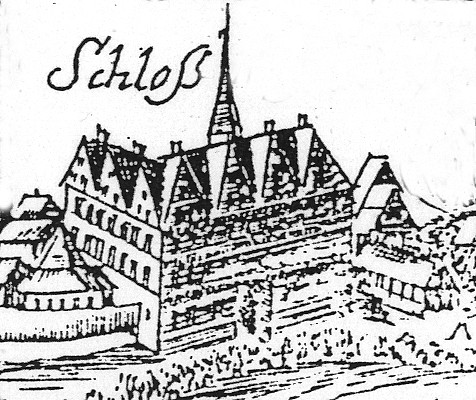 Ausschnitt aus "Calegia"